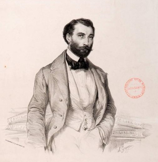 Uranio Fontana in una litografia del 1850 di Antonio Greppi